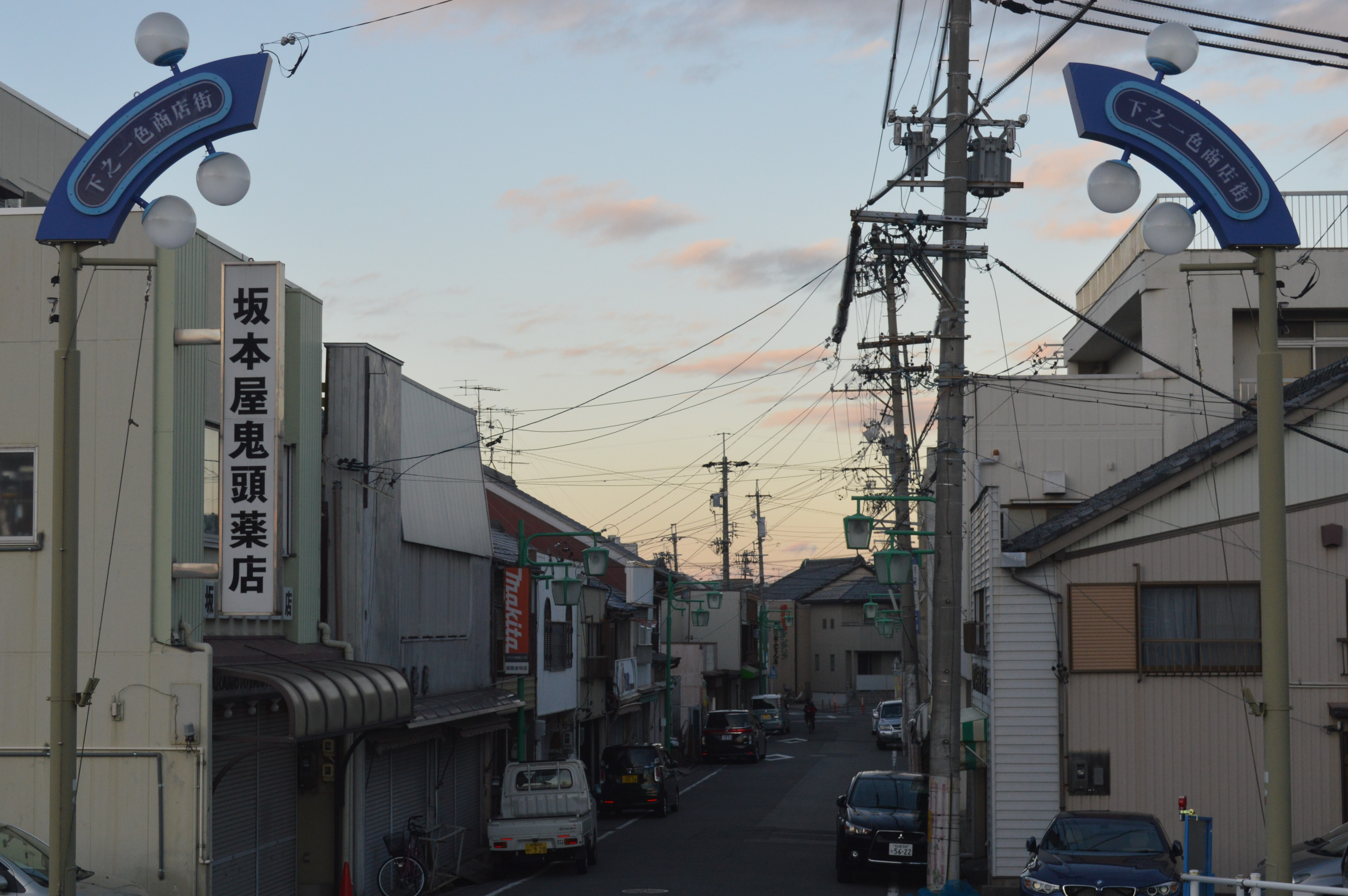 愛知県名古屋市中川区下之一色町にある下之一色商店街。